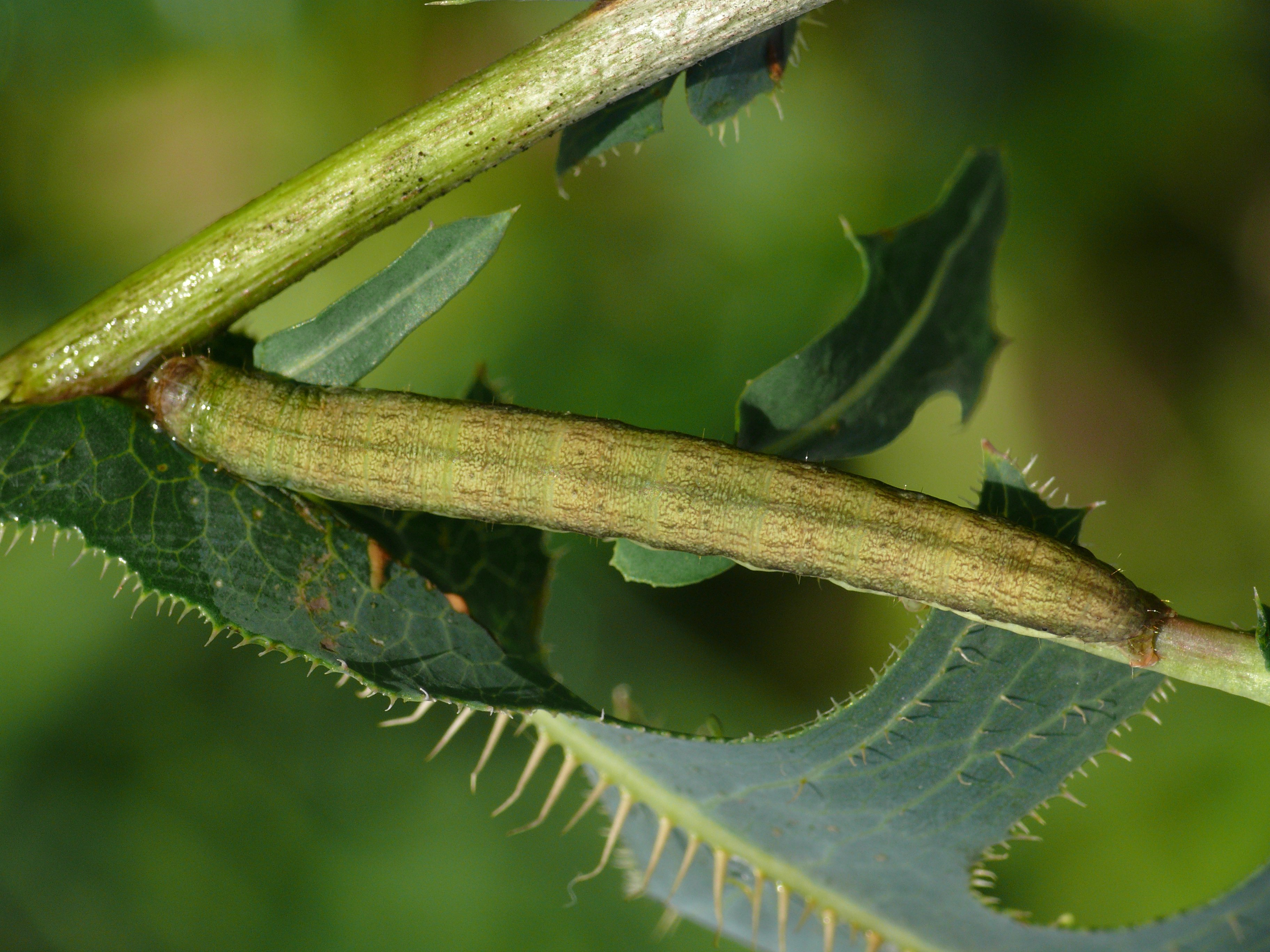 Raupe der Kompasslattich-Eule Hecatera dysodea, Münchner Umland